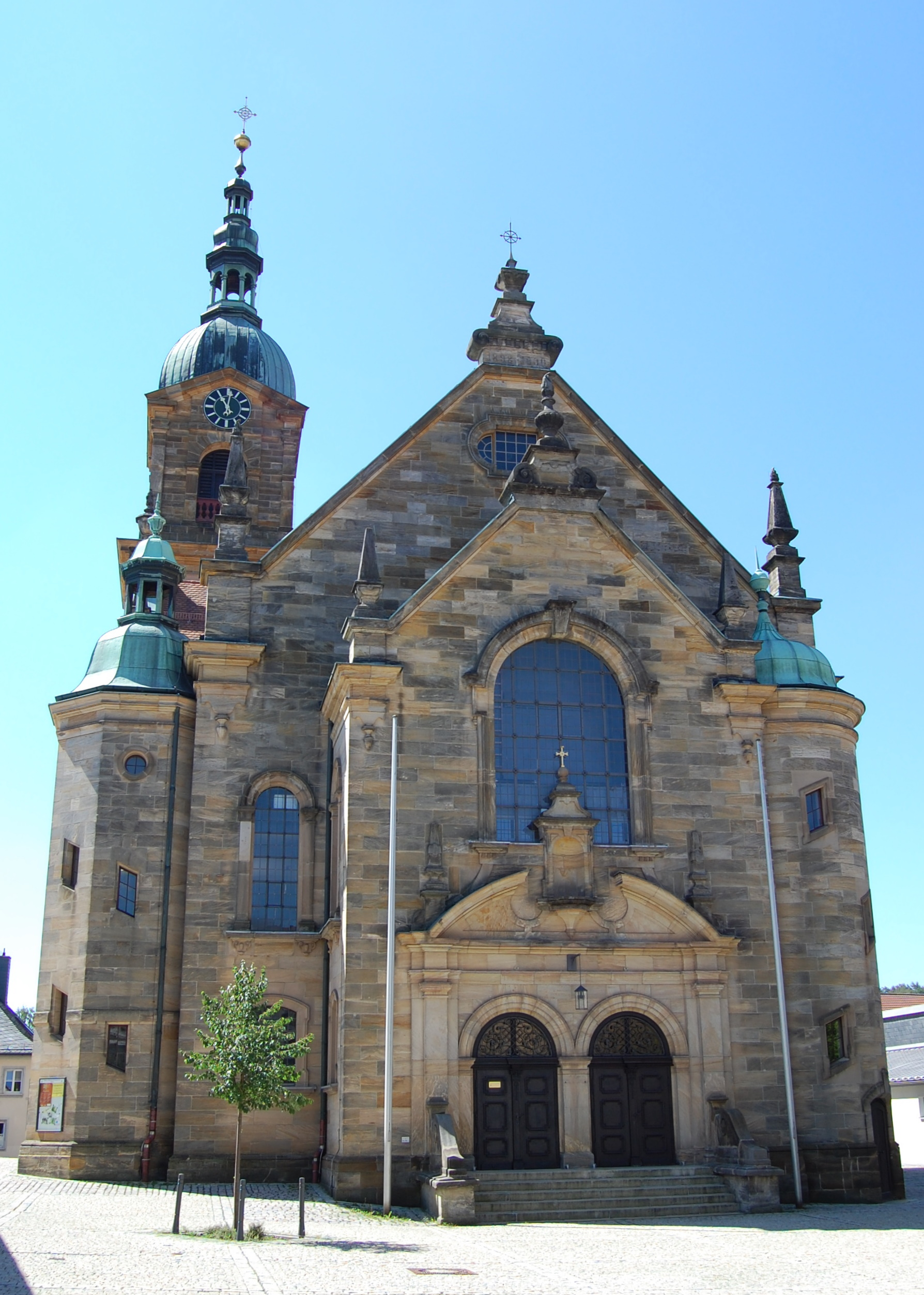 Bartholomäuskirche in Pegnitz